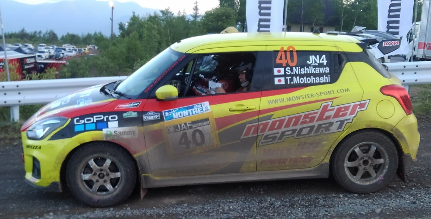 全日本ラリーに参戦する、モンスタースポーツのスイフトスポーツ